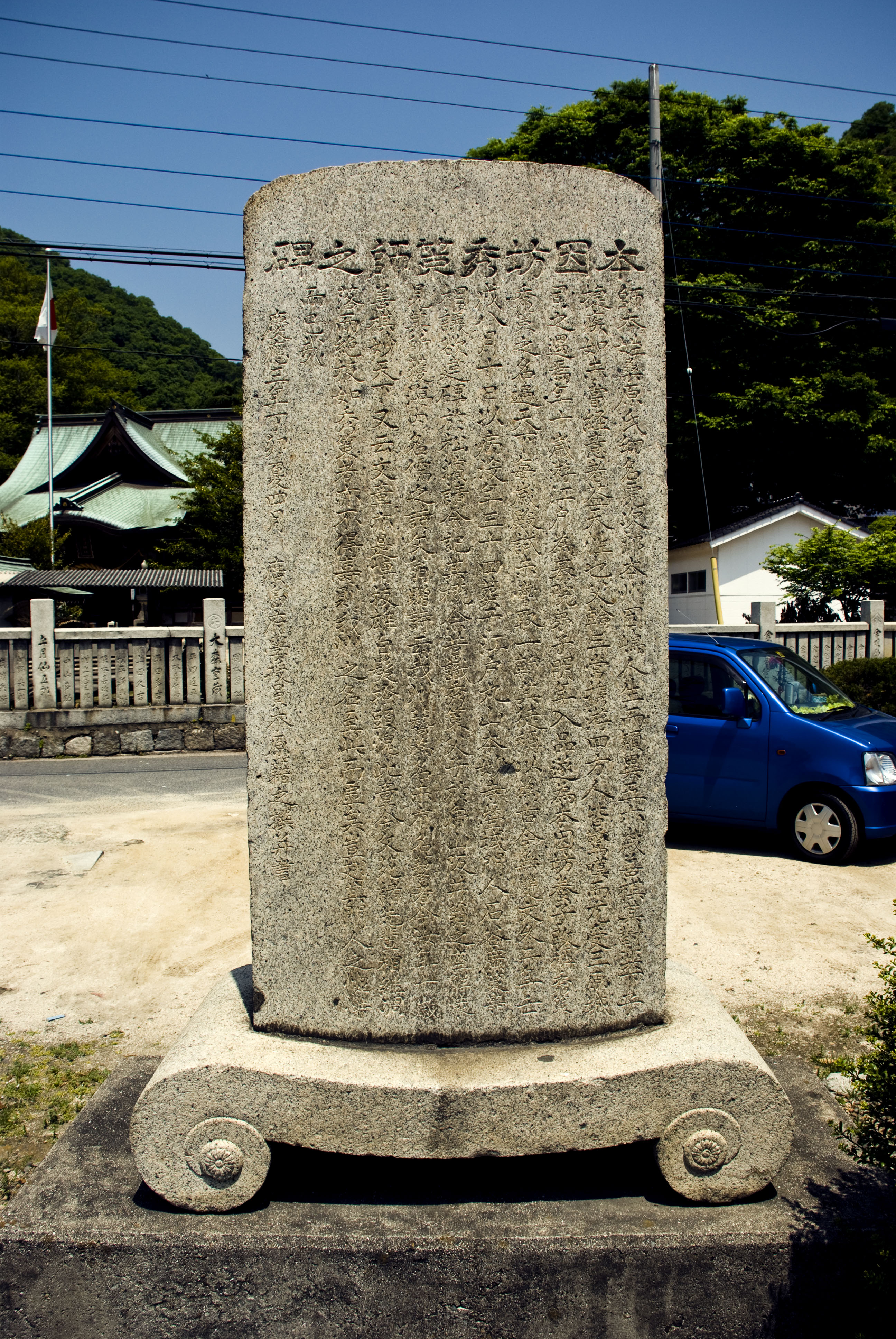 広島県三原市の糸崎神社境内に立つ本因坊秀策の石碑